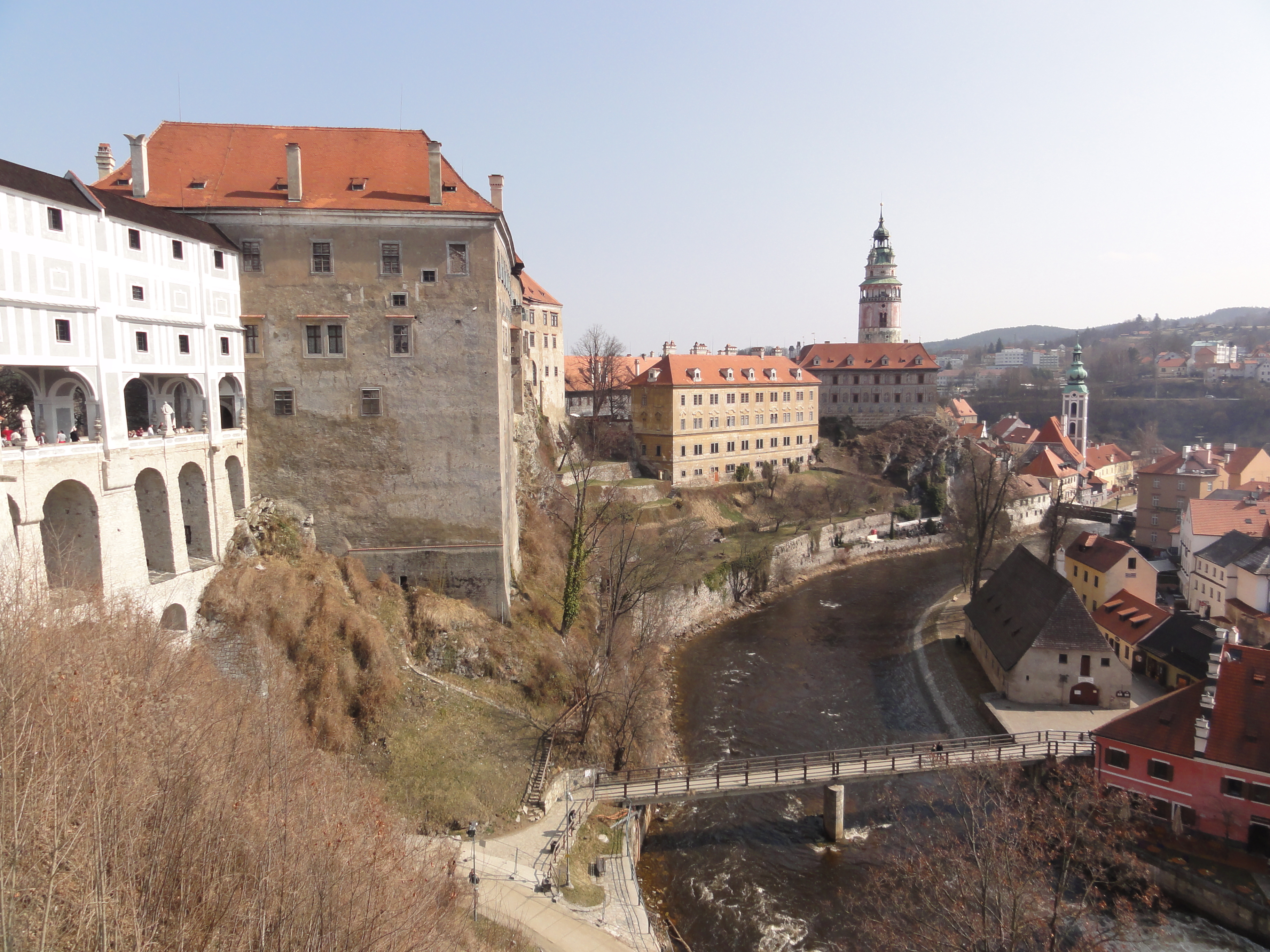 Státní hrad a zámek Český Krumlov